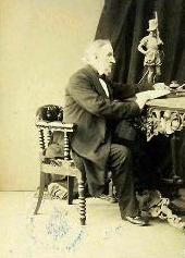 Uomo politico italiano, ministro del Regno di Sardegna